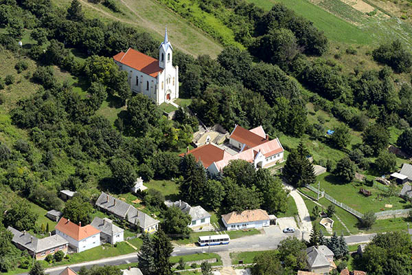 Légi fotó Lókútról